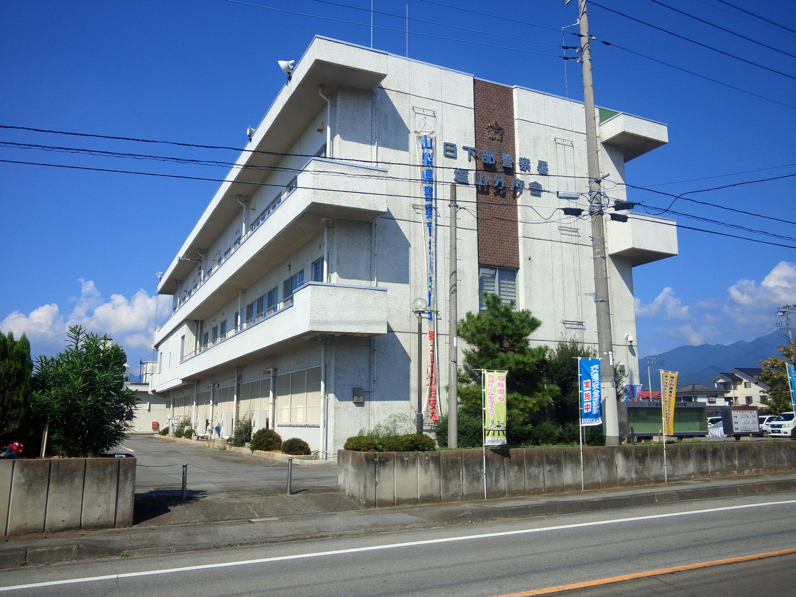 日下部警察署塩山分庁舎（建物南側付近を撮影）